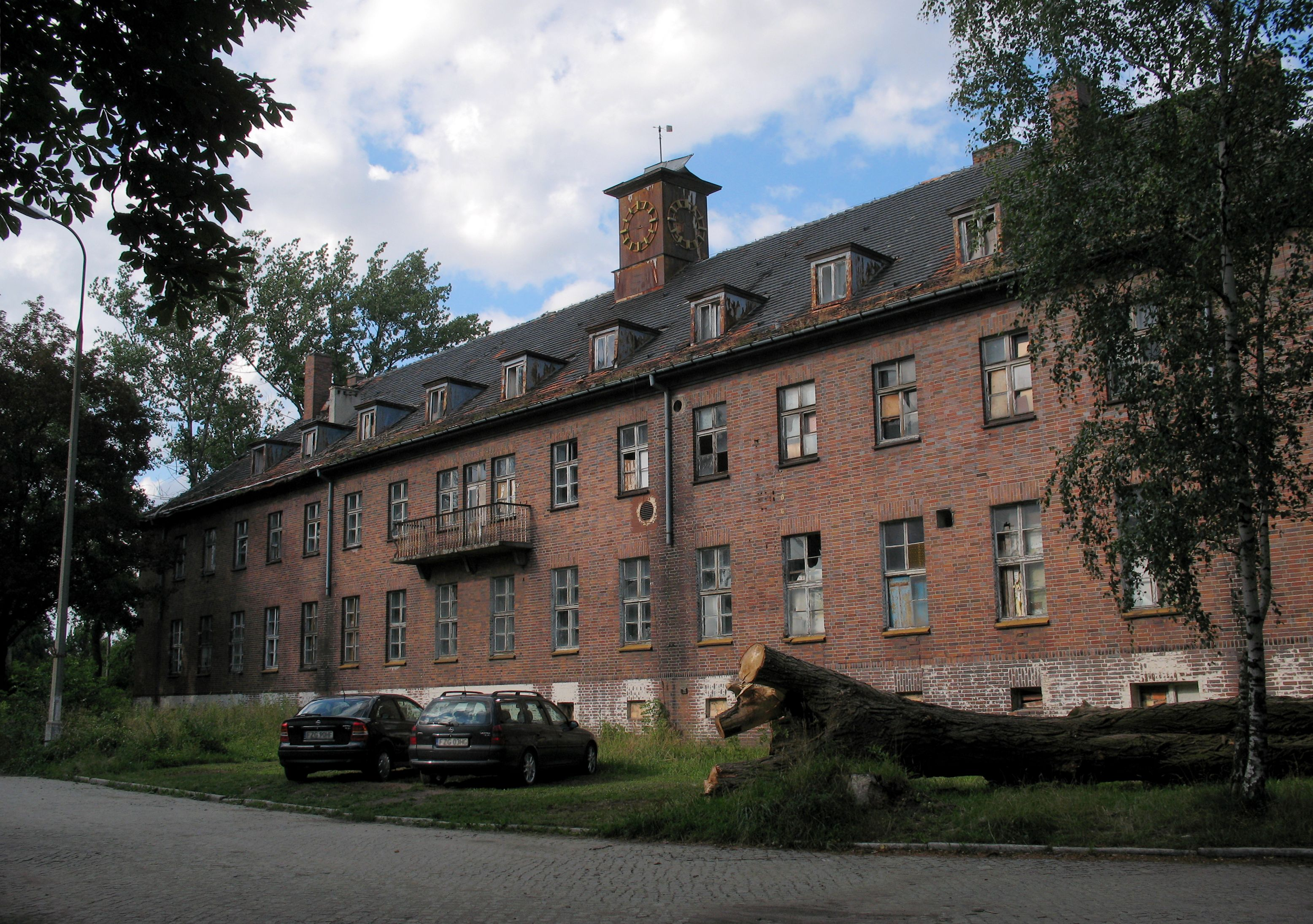 Budynek dawnych koszar w Szprotawie. 2007